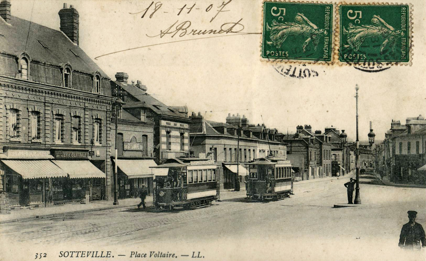 Carte postale ancienne éditée par LL, n°352 : SOTTEVILLE : Place VoltaireAncien tramway de Rouen